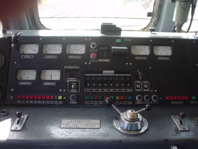 Banco di manovra E.656